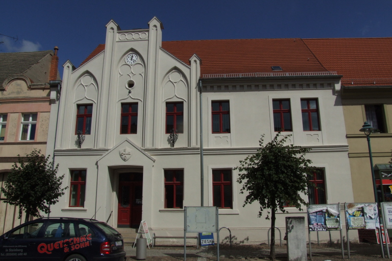 Rathaus in Ziesar